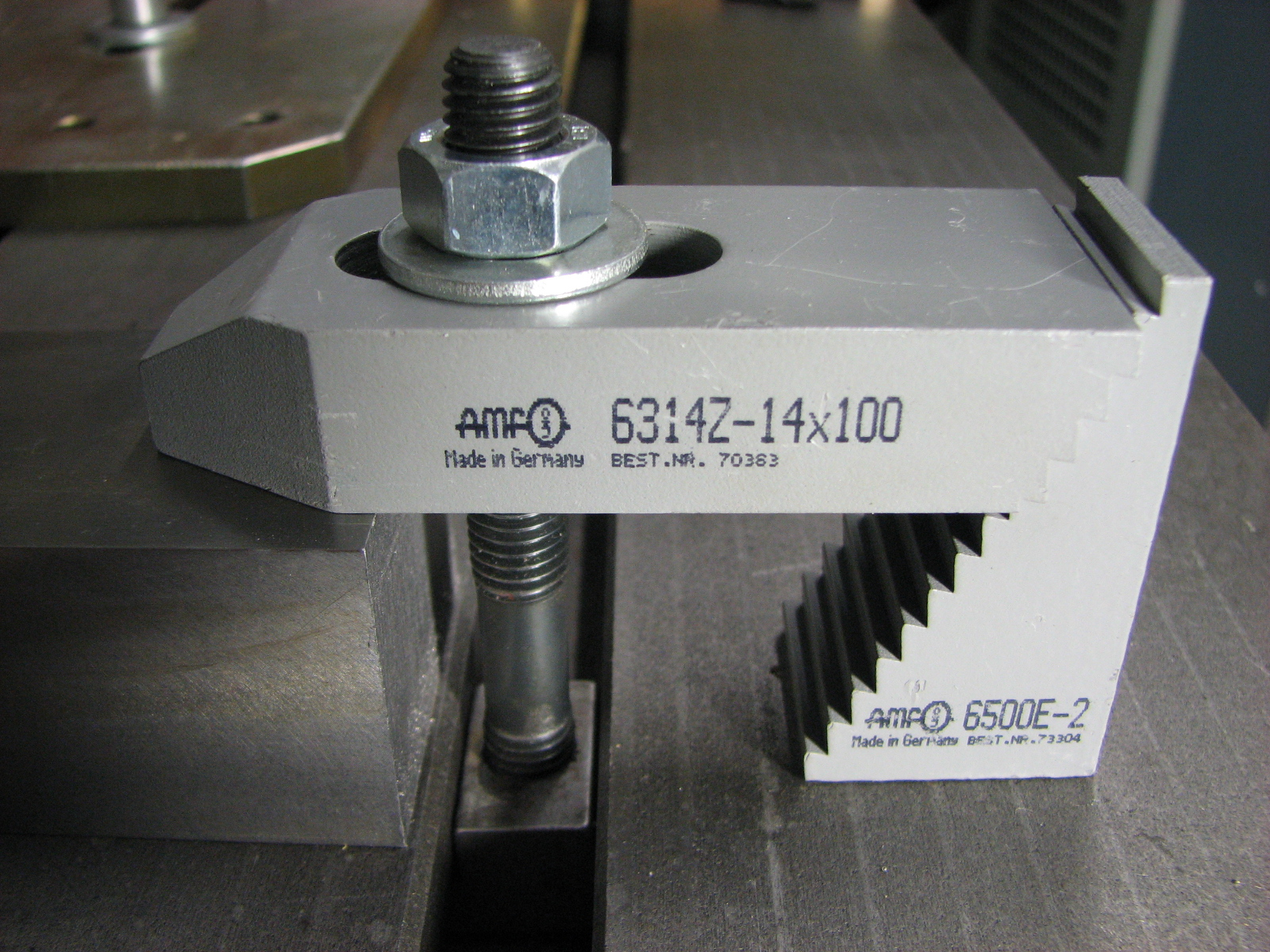 Spanneisen mit Treppenbock und Spannschraube